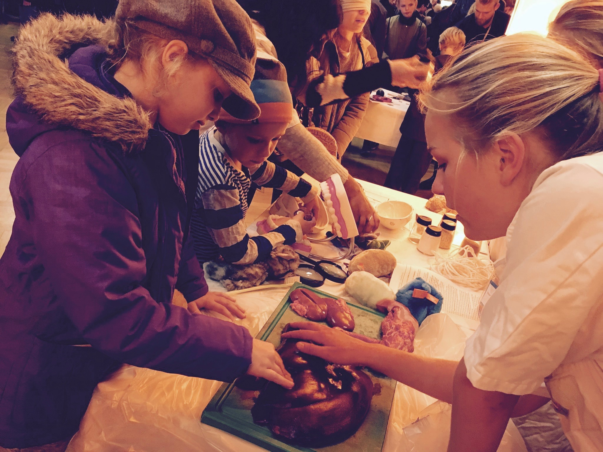 Sund Krop til Kulturnatten i Uddannelses- og Forskningsministeriet, oktober 2017.